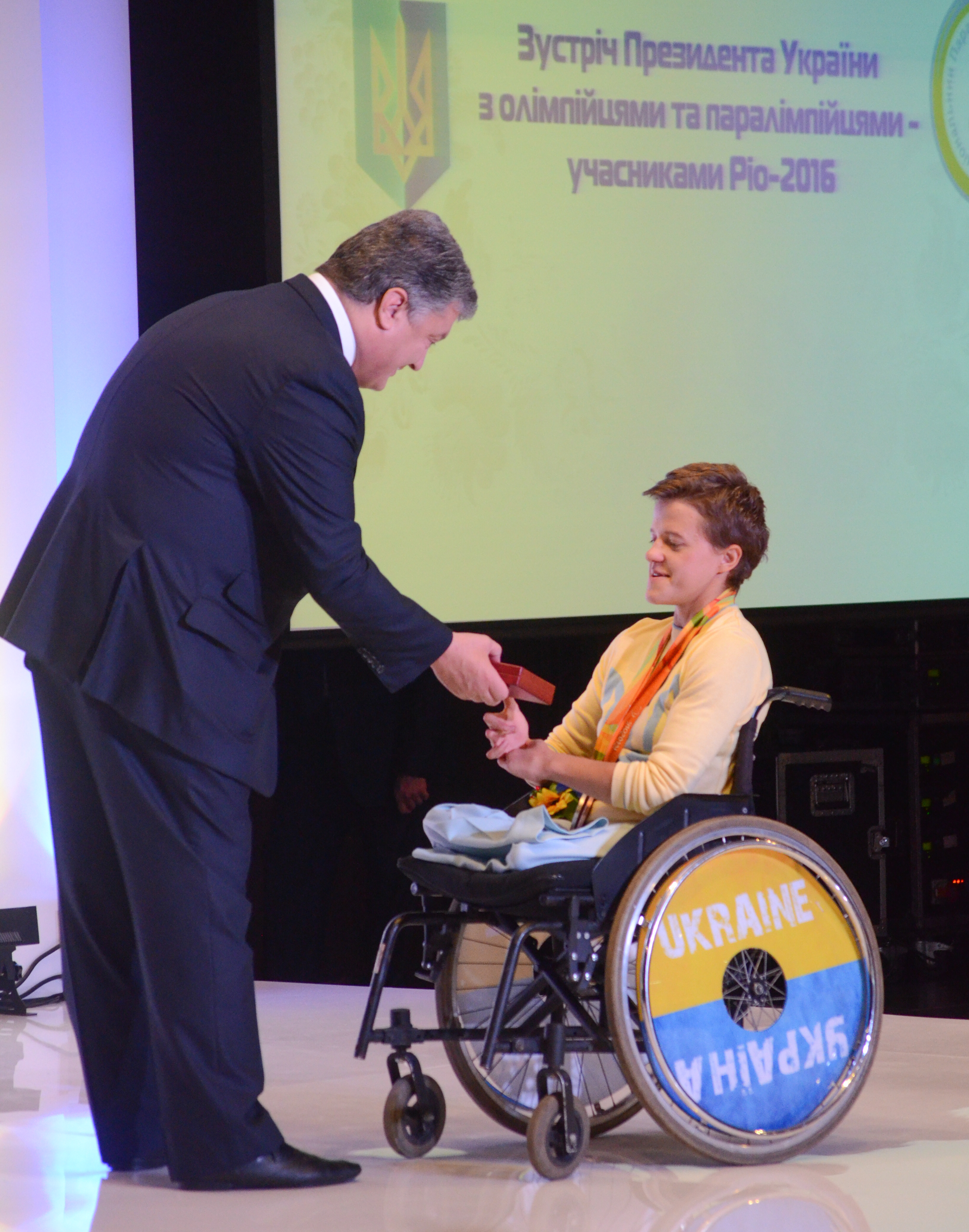 Зустріч Президента України з олімпійцями та паралімпійцями — учасниками Ріо-2016.